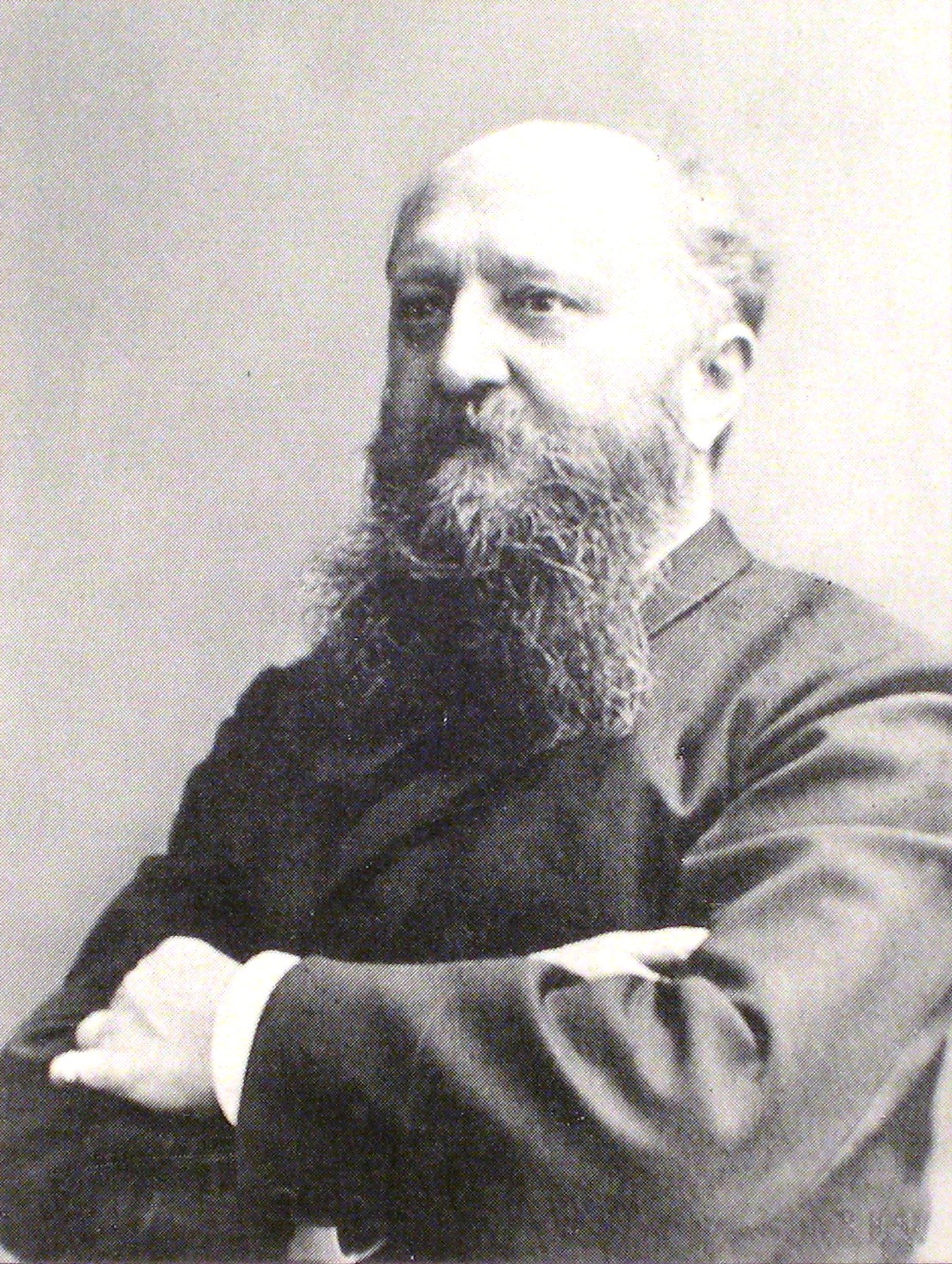 Portrait von Emil Pirazzi, Dichter und Schriftsteller aus Offenbach am Main, Deutschland